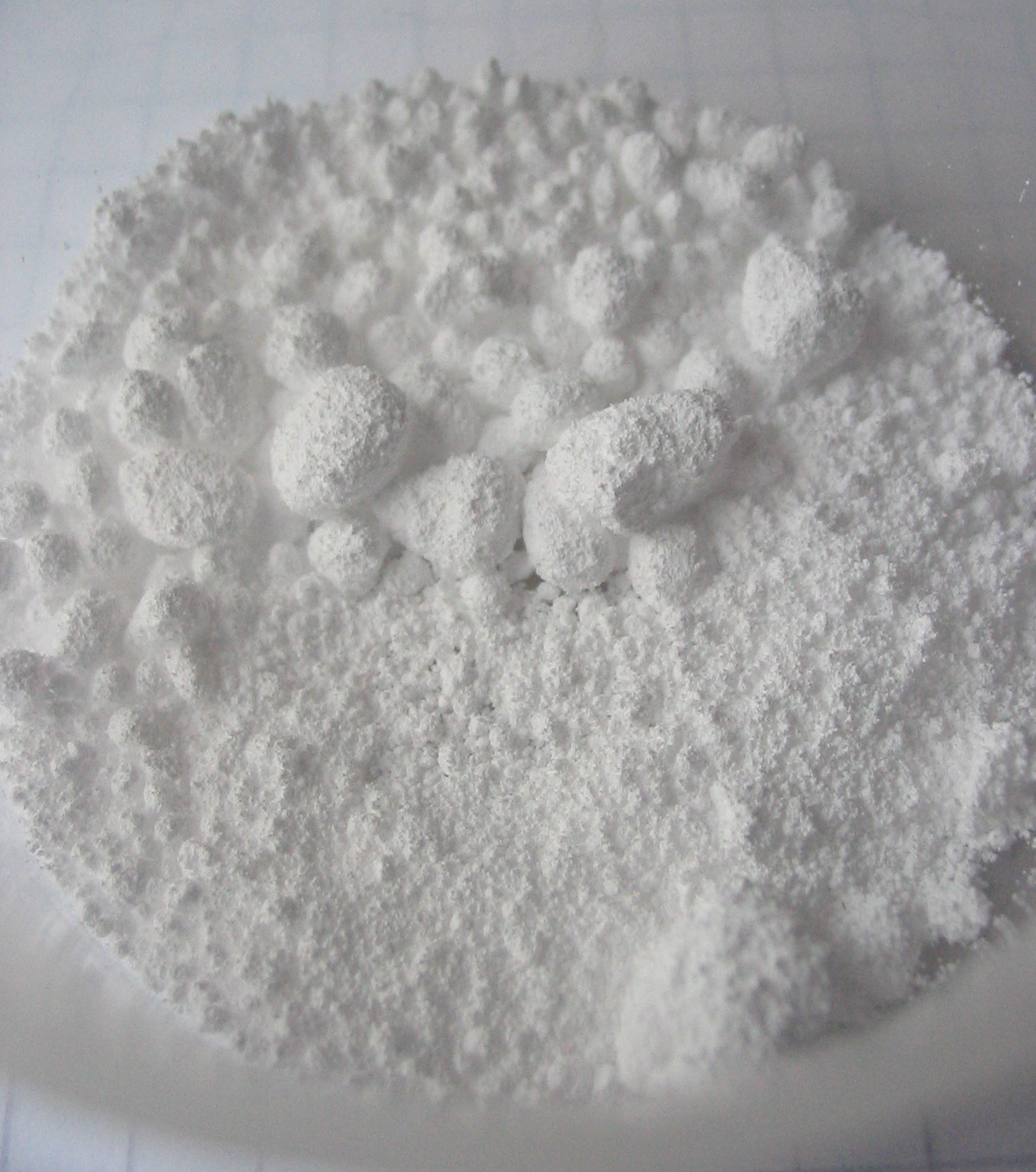 Bariumsulfatpulver, Barium sulfate, BaSO4, aufgenommen während des Chemie-Nebenfachpraktikums am IAC der RWTH Aachen